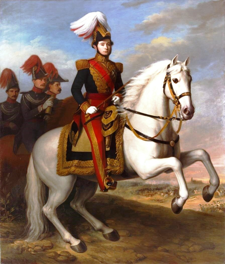 Retrato ecuestre del general español Juan Prim (1814-1870), que llegó a ser presidente del Consejo de Ministros de España y ostentó los títulos de conde de Reus, marqués de los Castillejos y vizconde del Bruch.